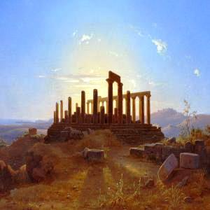 Der Tempel von Agrigent, 1841, Öl auf Leinwand, 37 x 60 cm